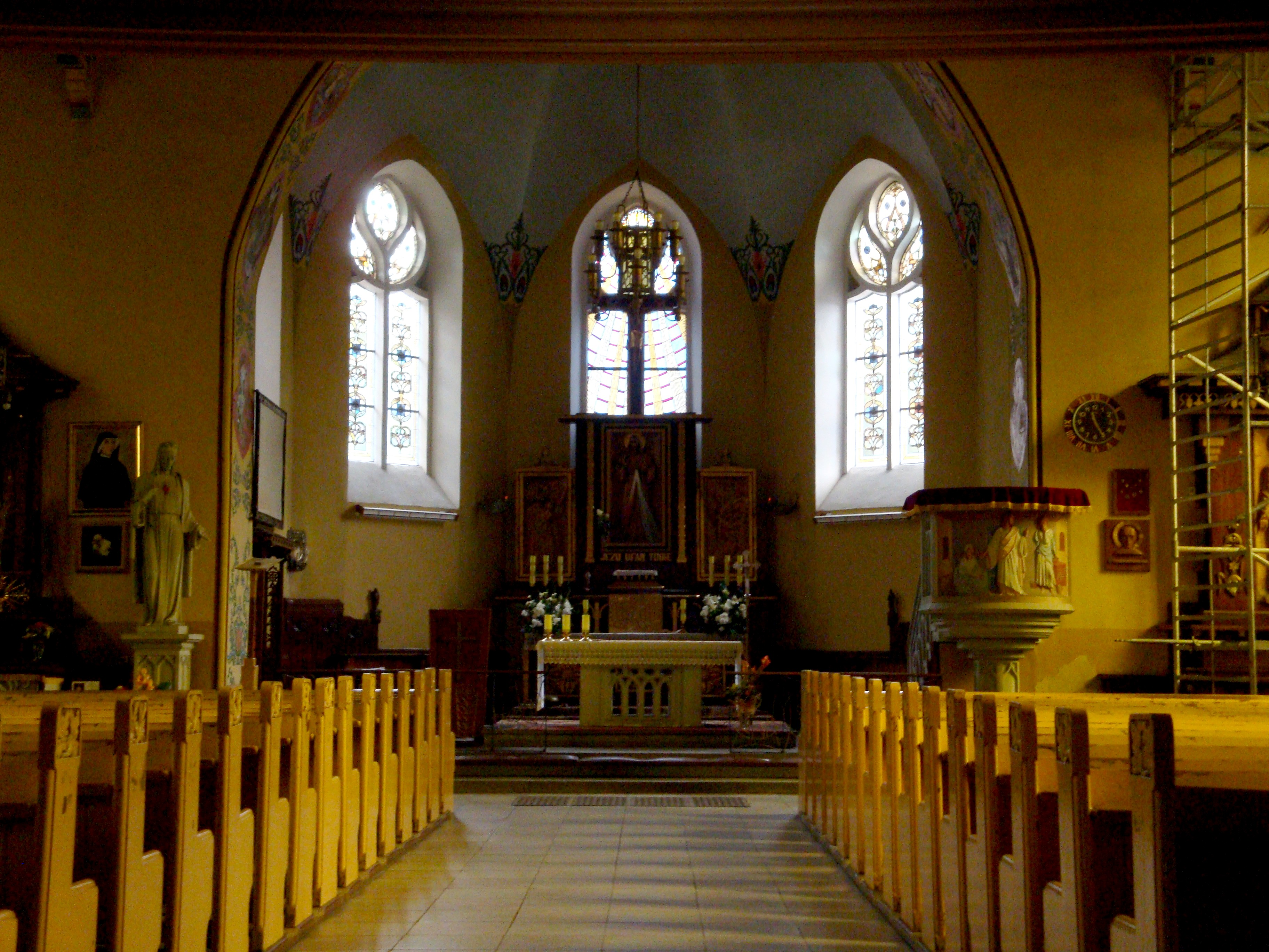 Bydgoszcz, ul. Nakielska 68a - dawny kościół ewangelicki, obecnie rzymskokatolicki parafialny p.w. Miłosierdzia Bożego, 1905-06, wnętrze